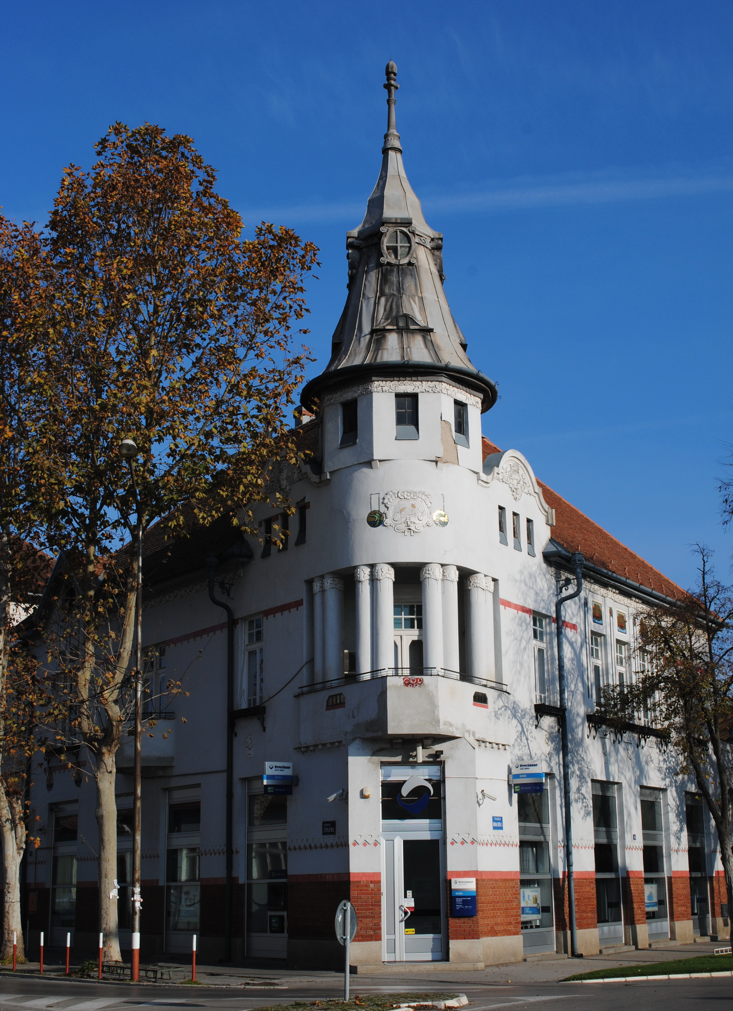 Srpskohrvatski / српскохрватски: Lepedatova palata u Kikindi